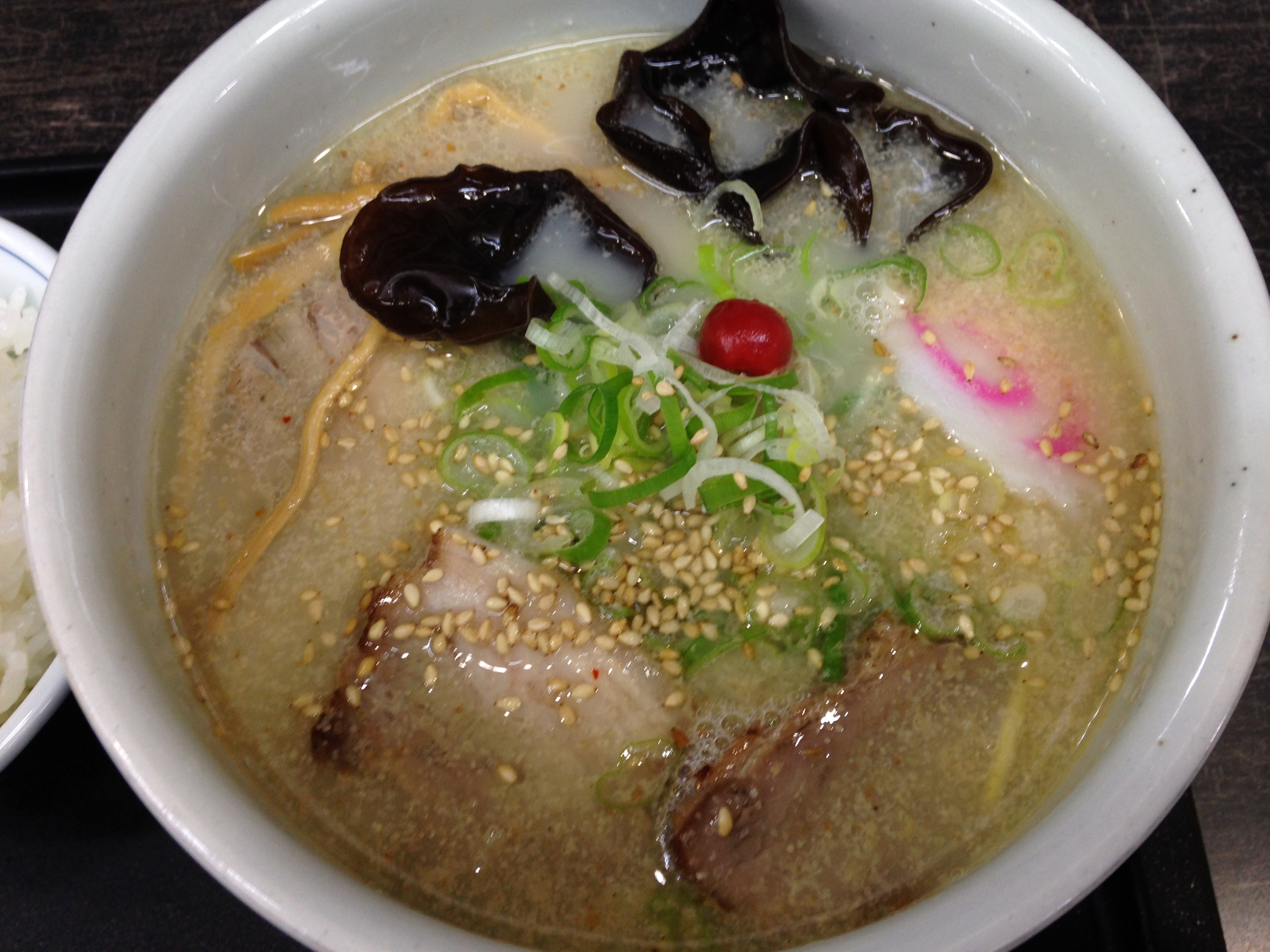 らーめん山頭火のしおらーめん